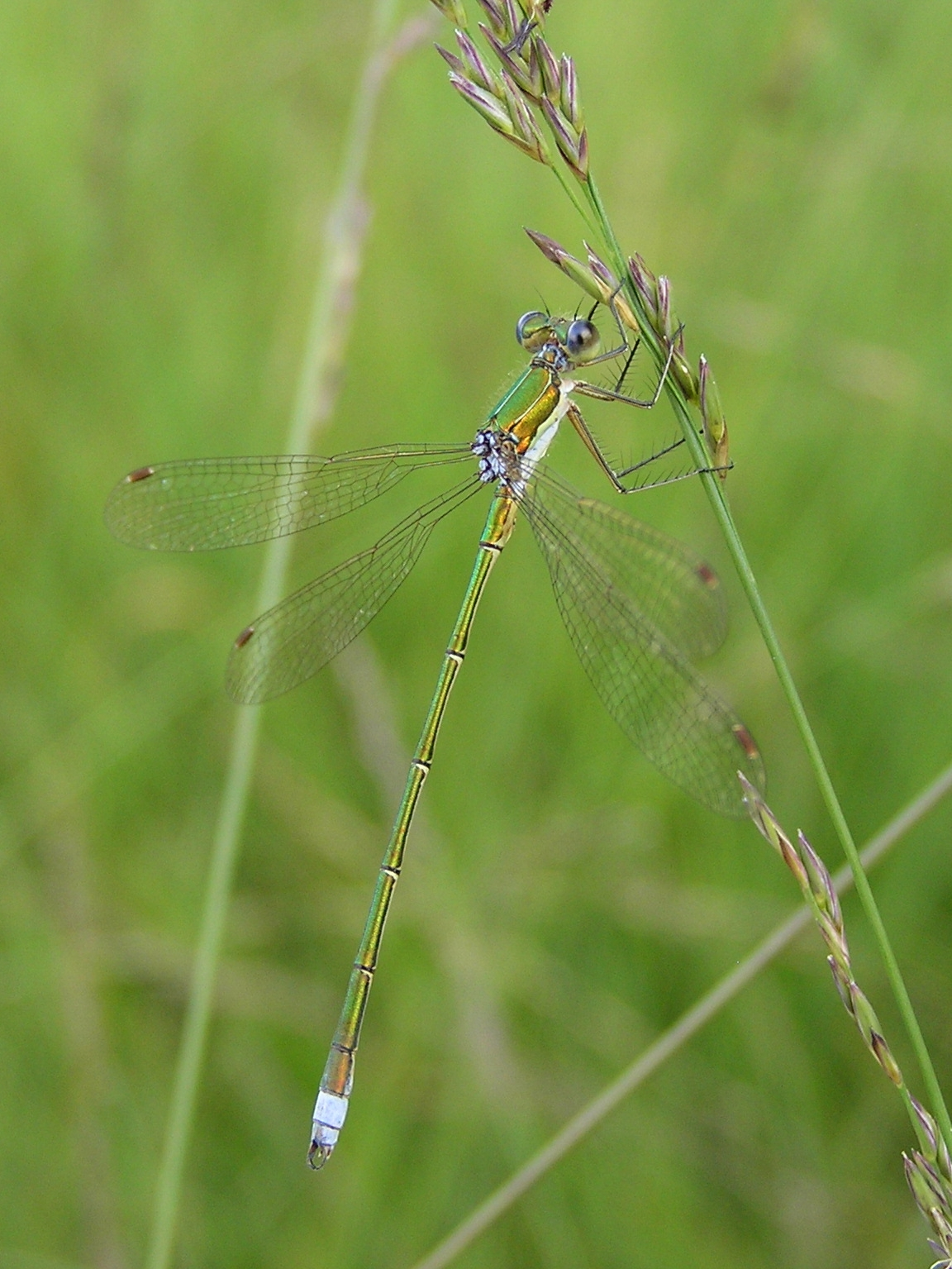 Kleine Binsenjungfer (Lestes virens)